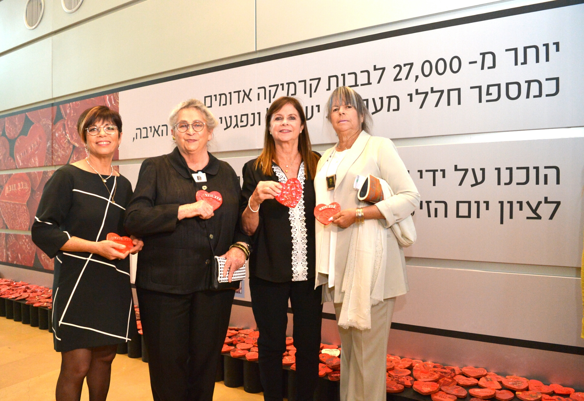 נחמה ריבלין רעיית נשיא מדינת ישראל בטקס פתיחת מיצב "הלב זוכר" ב"מרכז יצחק רבין" לזכר חללי מערכות ישראל ונפגעי פעולות האיבה. מימין - אל"מ (מיל') ורדה פומרנץ, ראש מרכז יצחק רבין דליה רבין, רעיית נשיא המדינה נחמה ריבלין ויוזמת ואוצרת המייצב, שלומית חפר